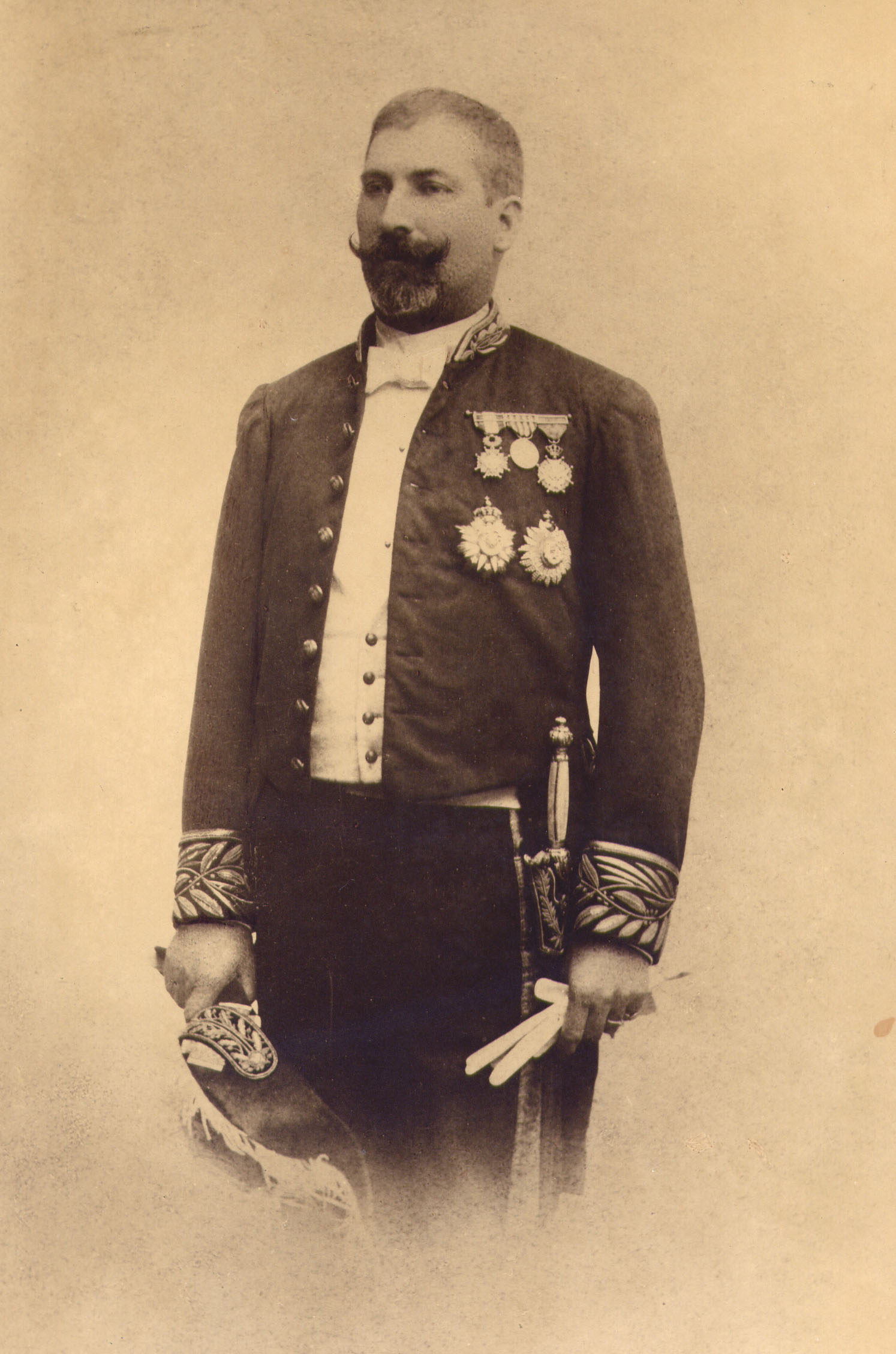 Conselheiro Correia e Lança, 1896